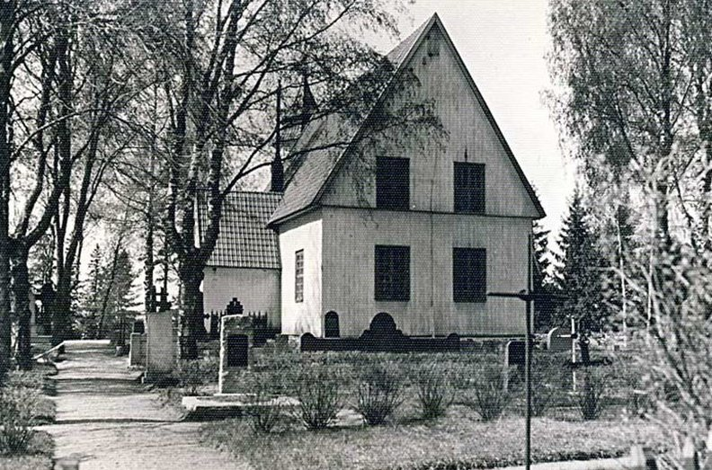 Angelniemen kirkkohan se tässä. Erikoista tässä kuvassa on päädyssä olevat toisen kerroksen ikkunat, joita ei toisessa kuvassa enää ole. Kuvan ottovuotta ei ole tiedossa